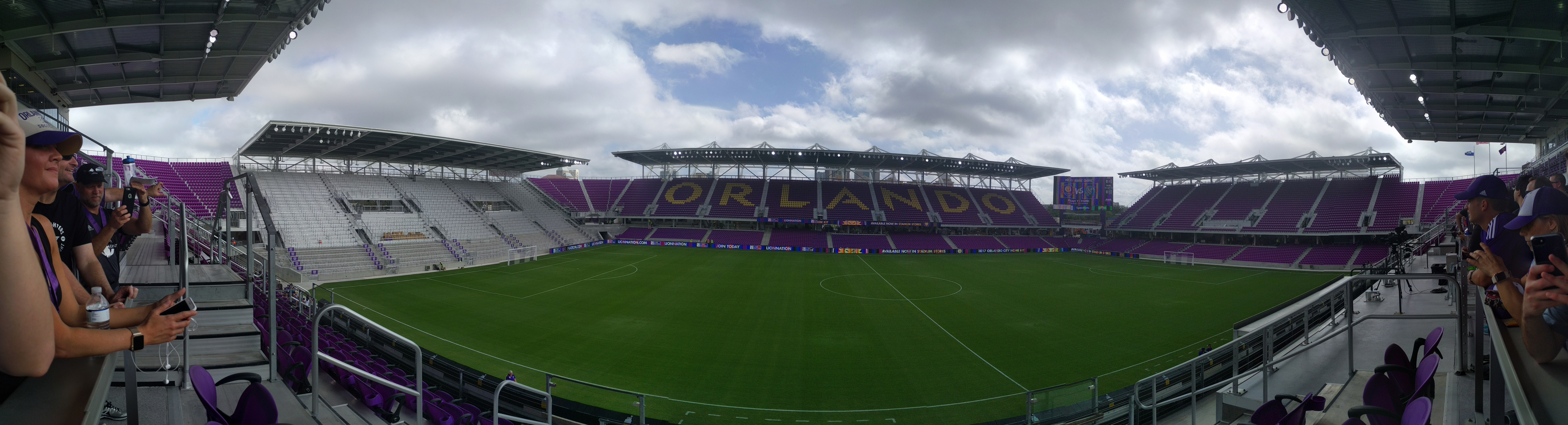 Open House Event